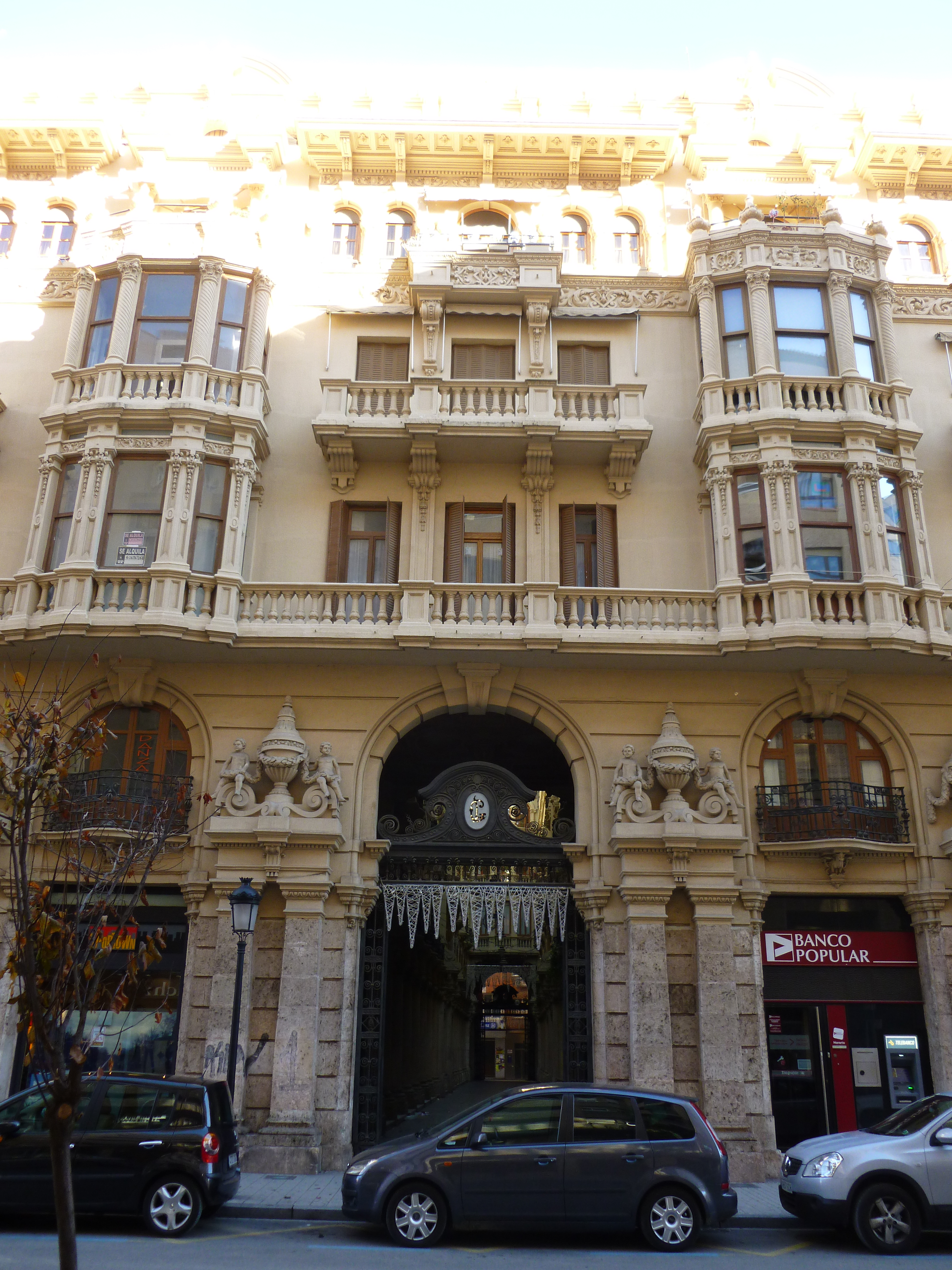 Pasaje de Lodares